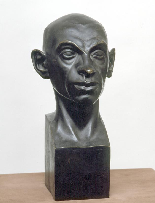 Head of a Man, painter Lajos Tihanyi (Férfi-fej, Tihanyi Lajos festő)